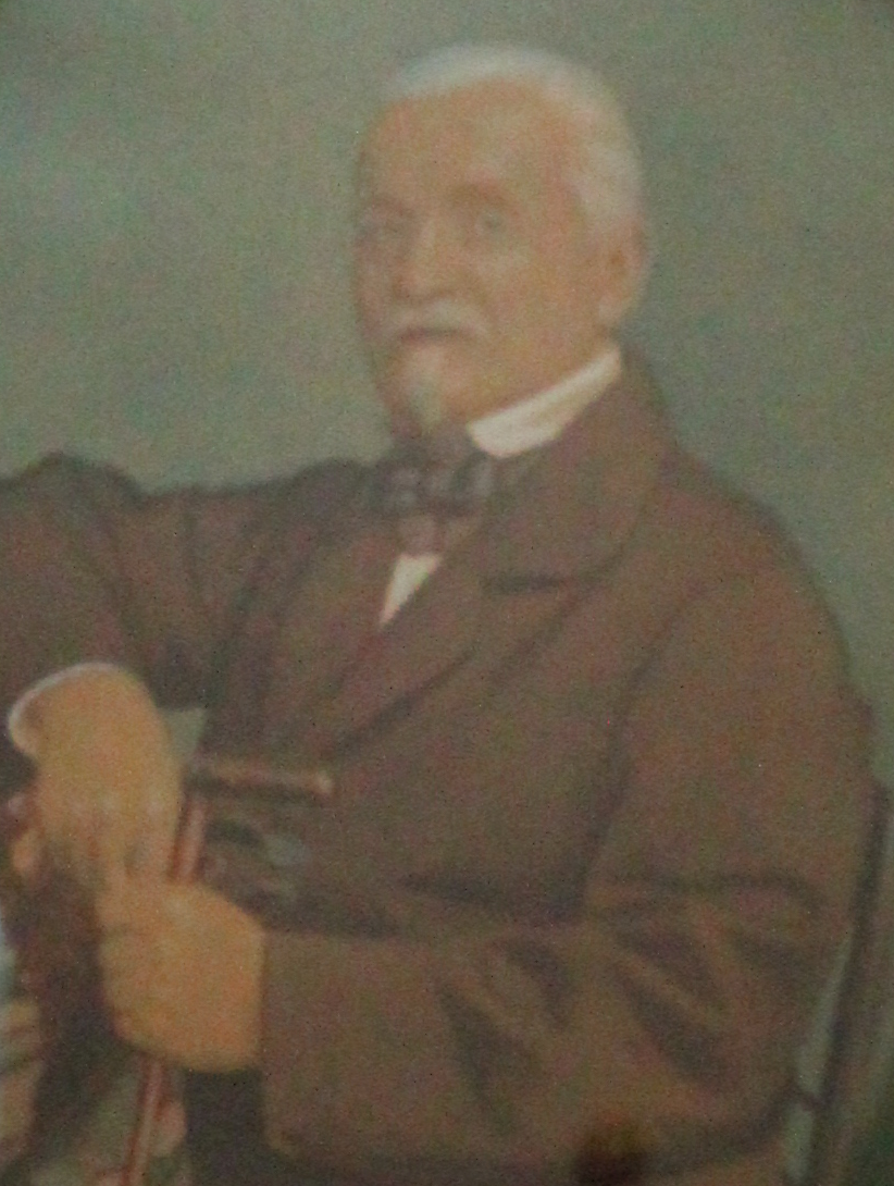 Fortunato Pio Castellani, Italian jeweller